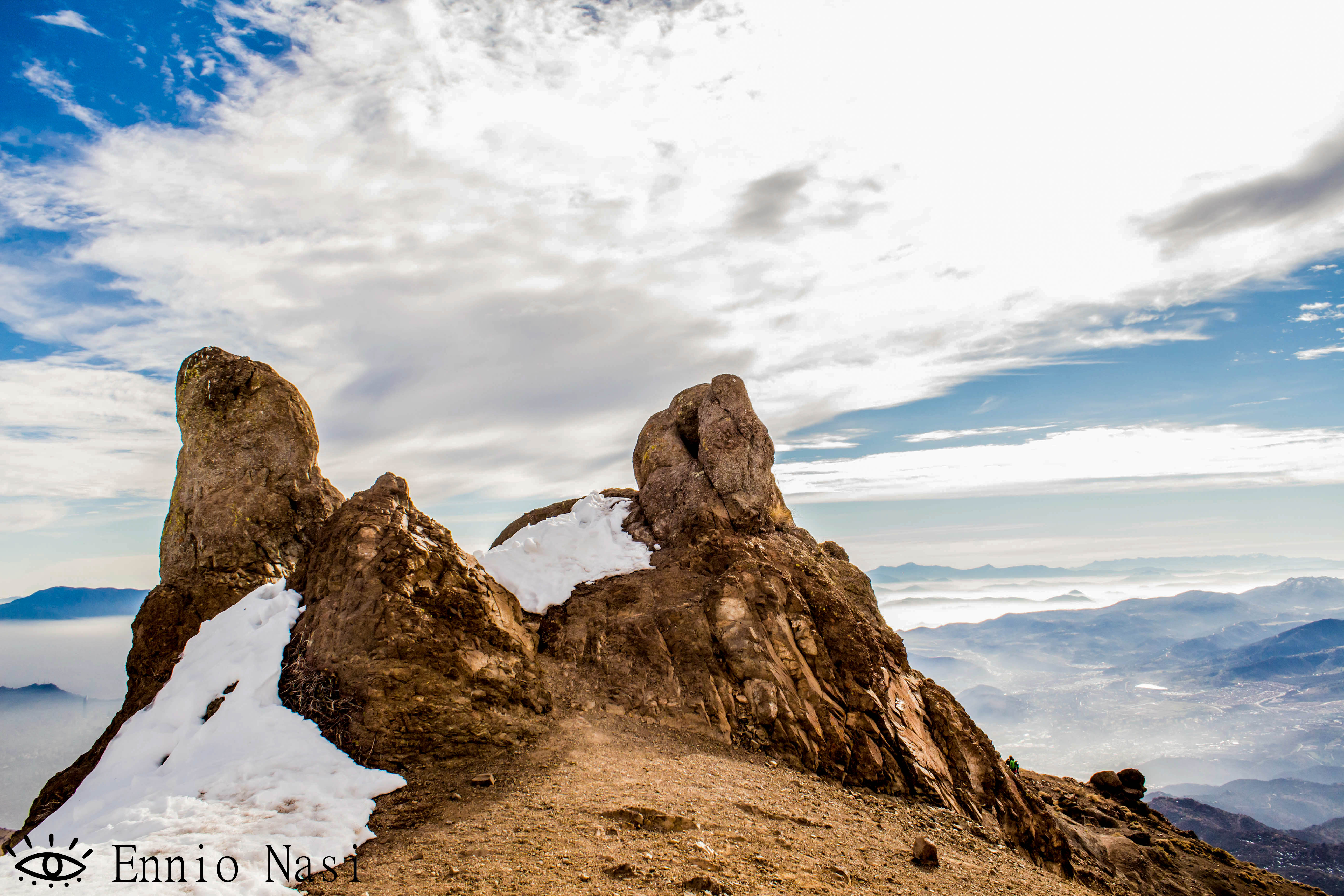 Piedras en sendero de cerro Provincia.